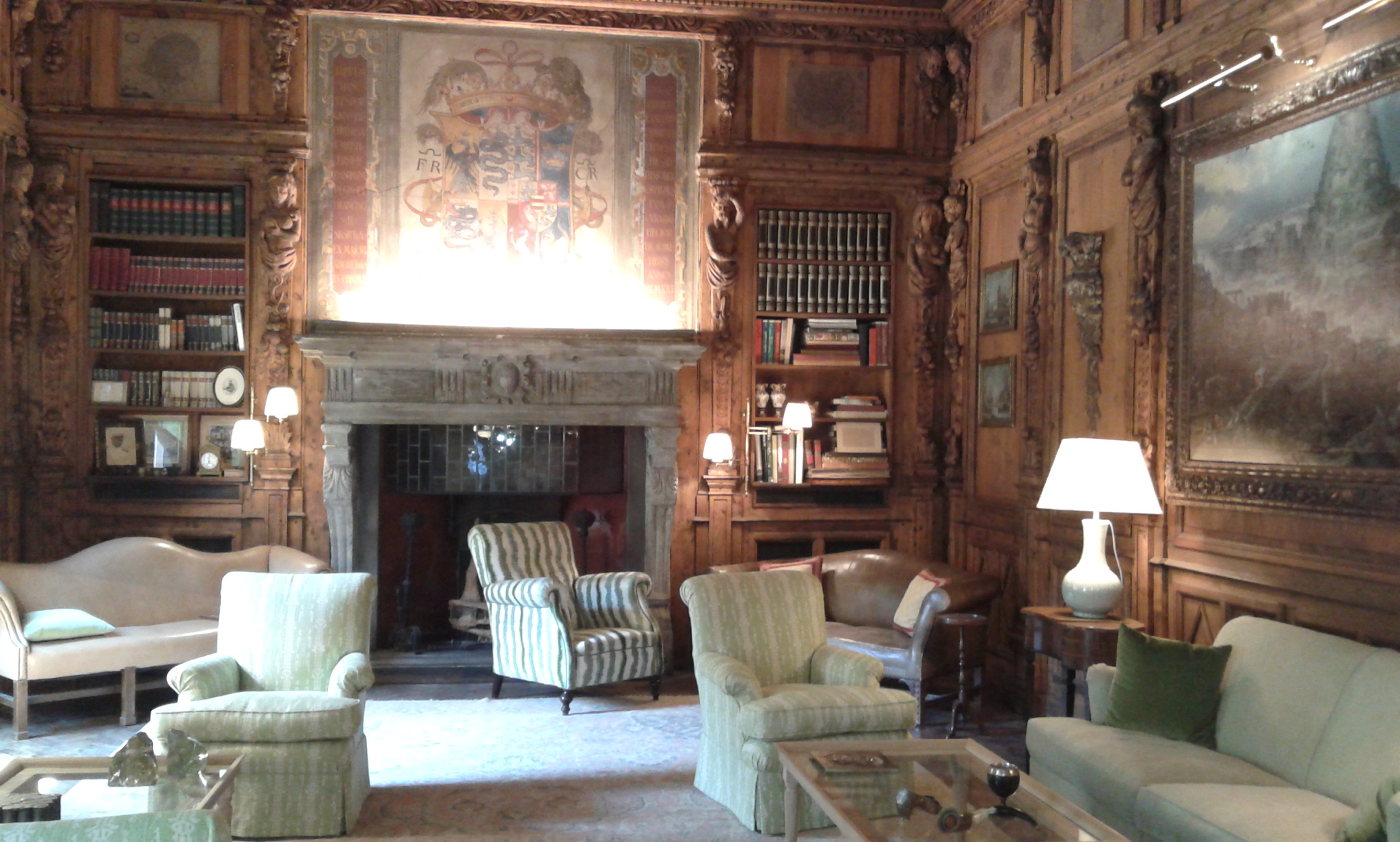 Casa degli Atellani (Milan), salotto